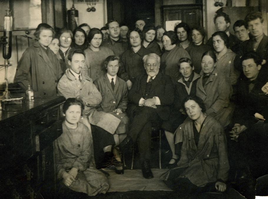 Профессор А.М. Беркенгейм со студентами 2-го МГУ